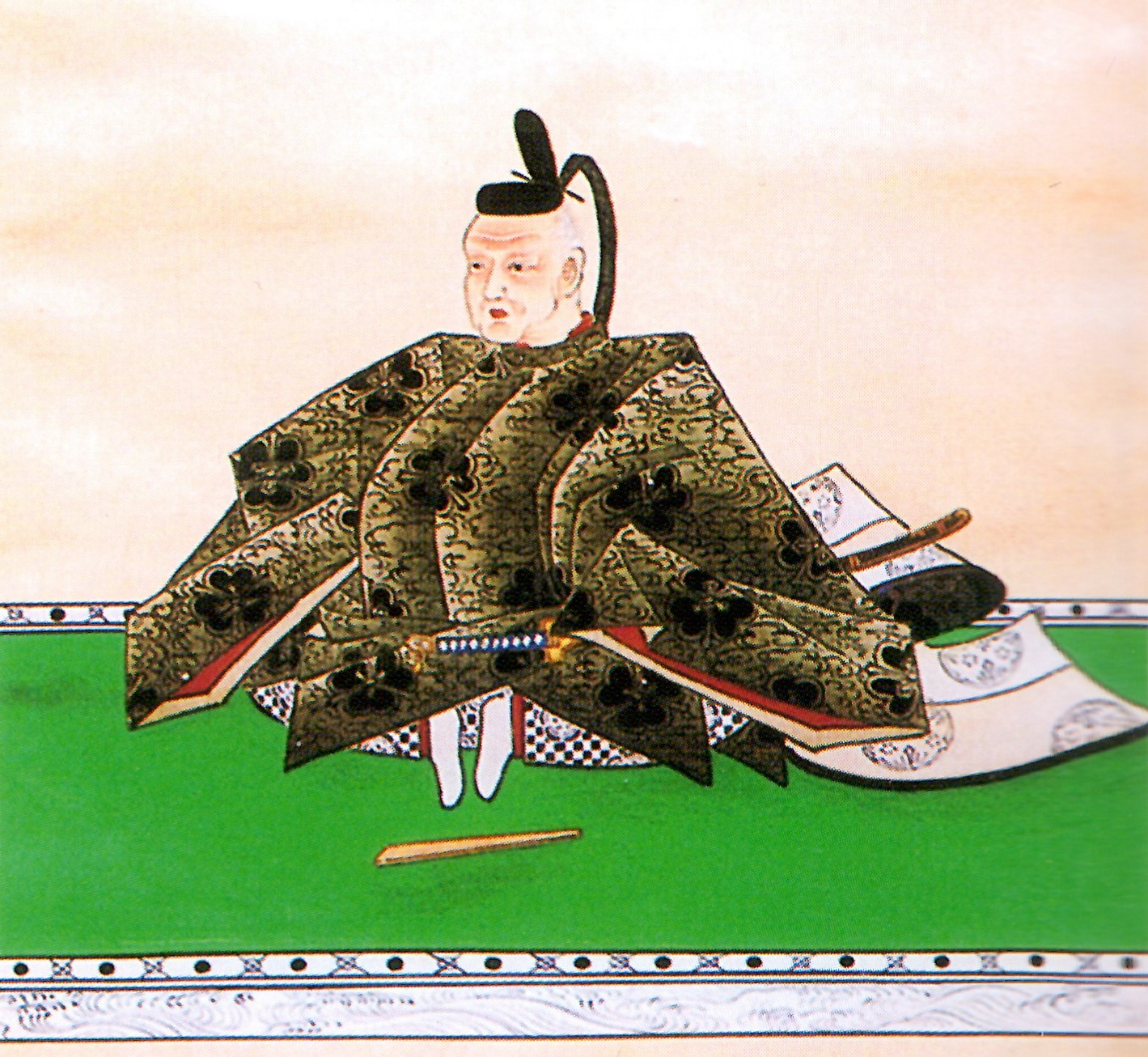 岡田善同の肖像。